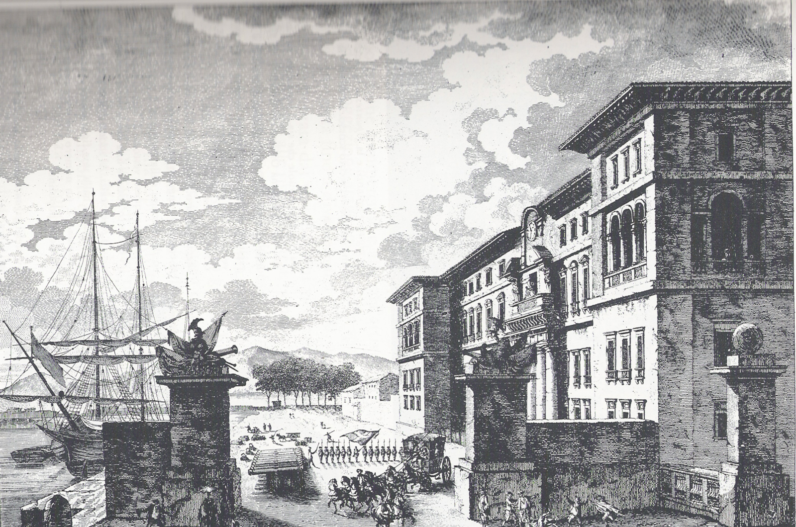 Il Palazzo Reale di Messina, prima del terremoto del 1783.